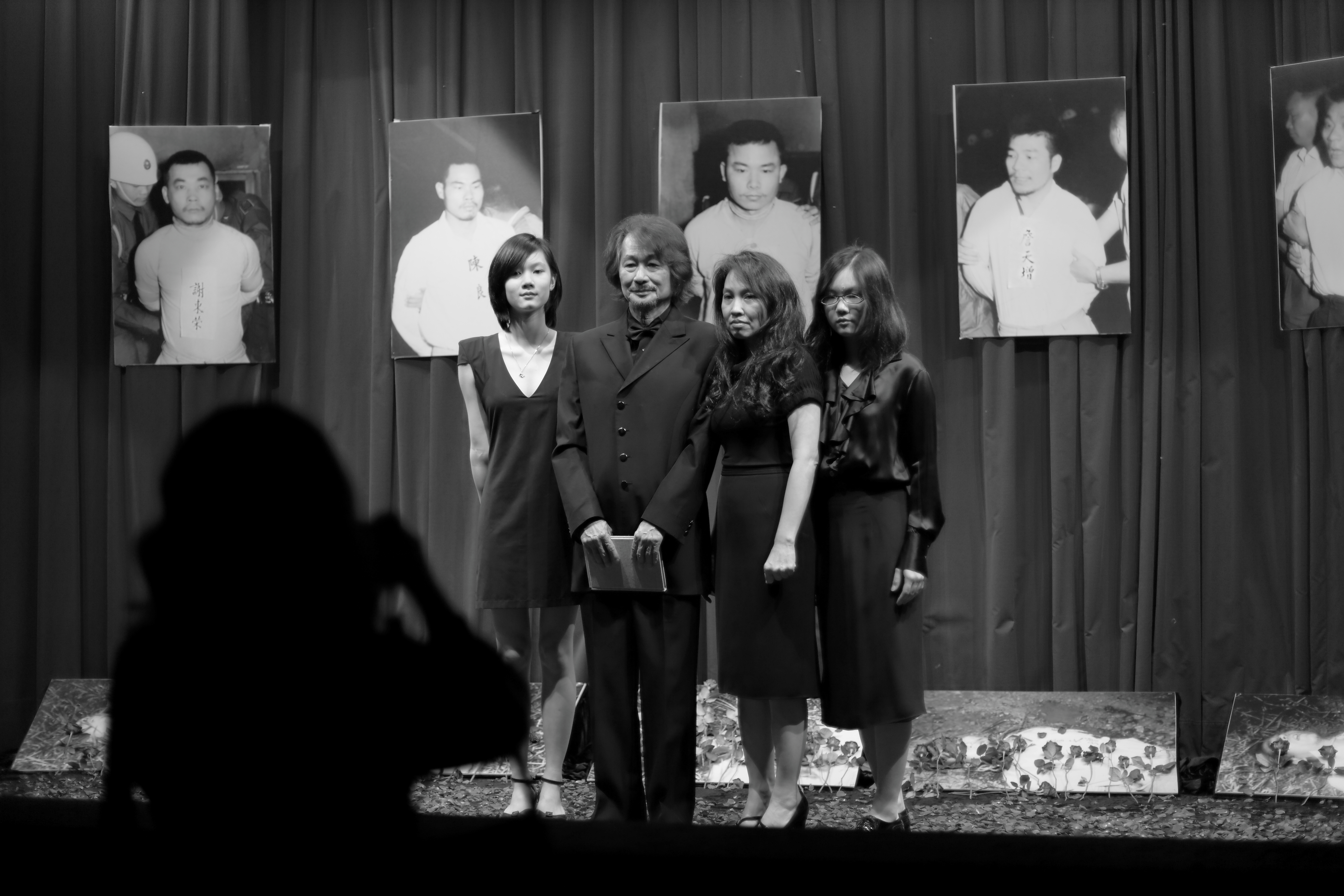 20130621「敬烈士」儀式